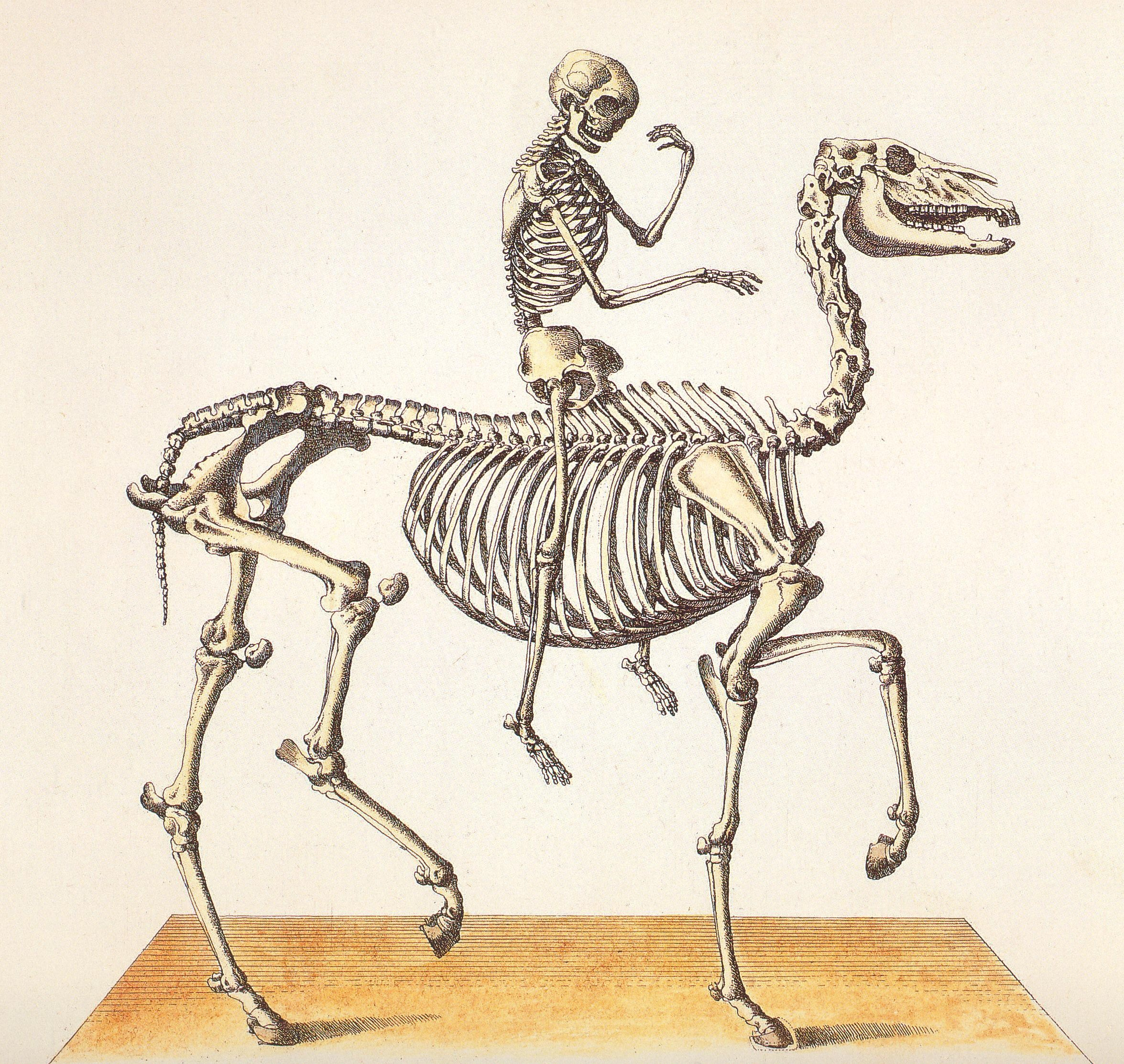 Шкілет чалавека і каня з кнігі Meyer I.D. Angenehmer und nutzlicher Zeit-Vertreib mit Betrachtung curioser…, 1748